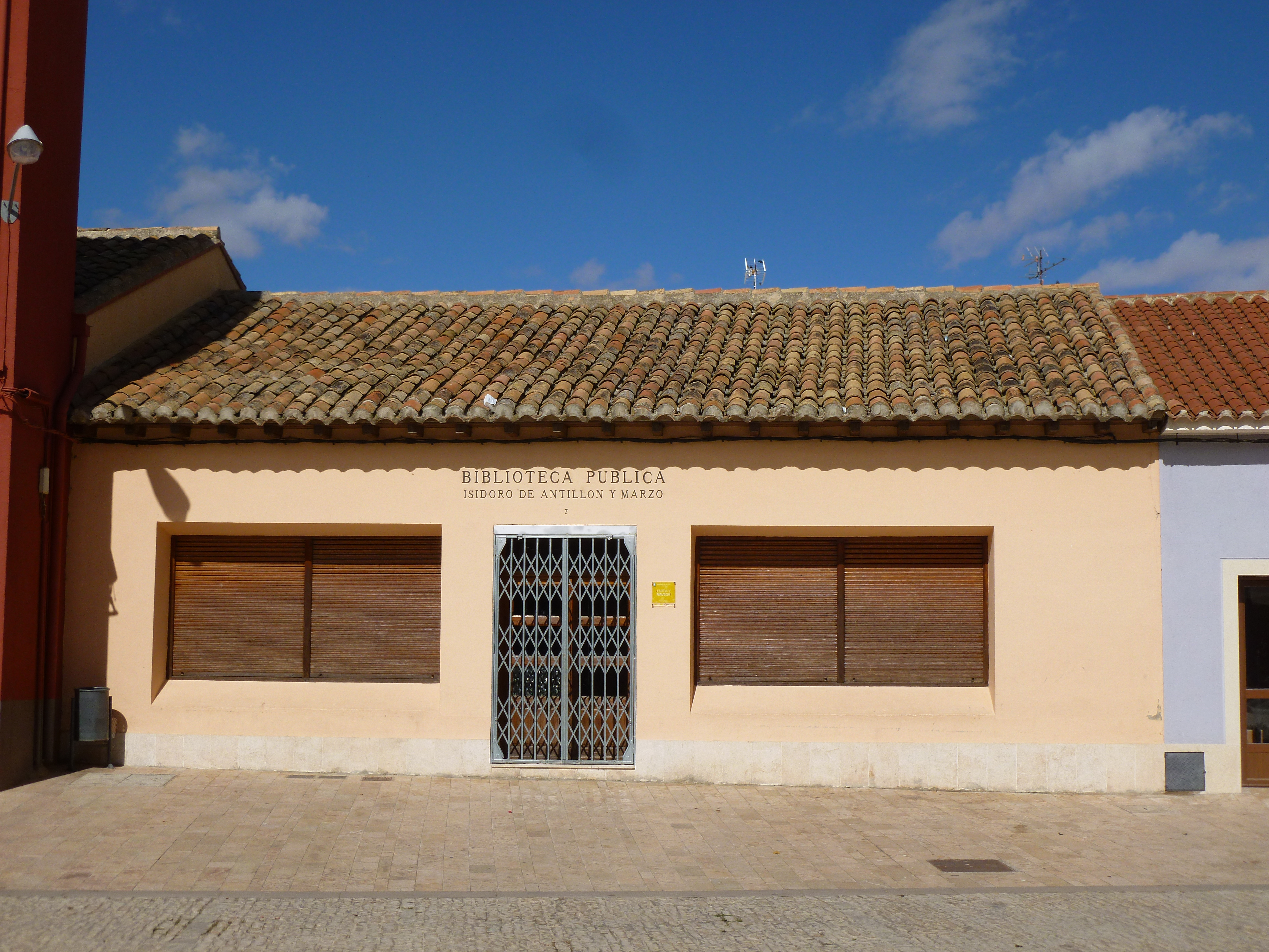 Santa Eulalia del Campo